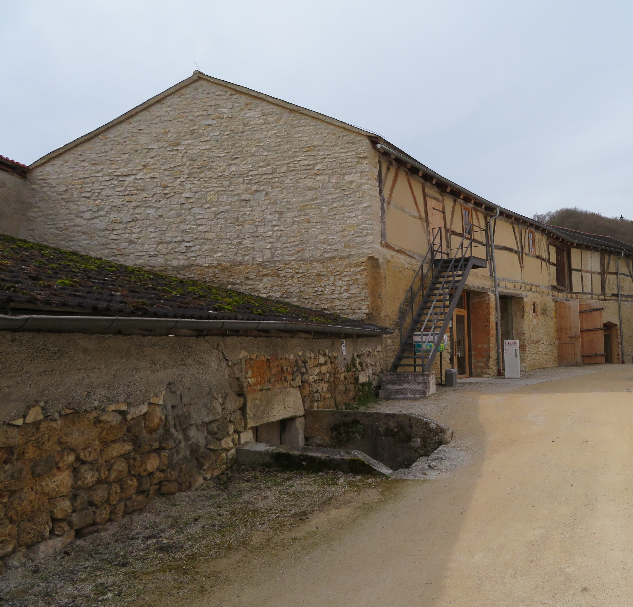 Altmühlzentrum Dollnstein